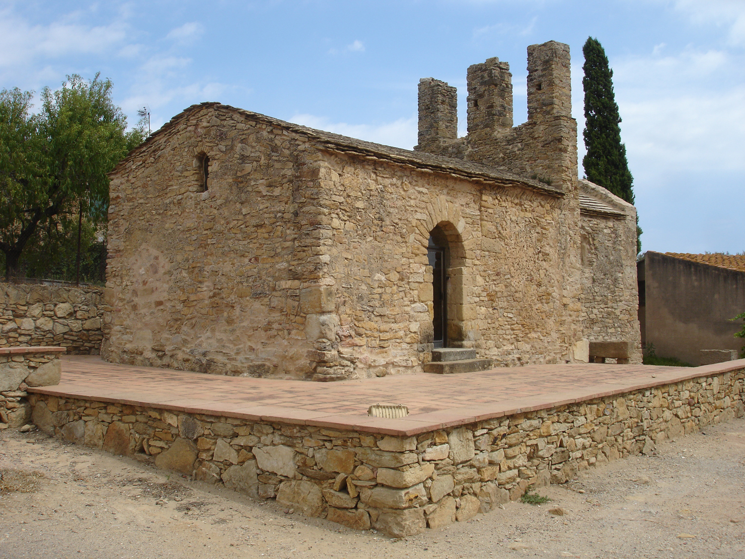 Eglesia de Sant Julià de Boada (Girona, Catalunya, Espanya)